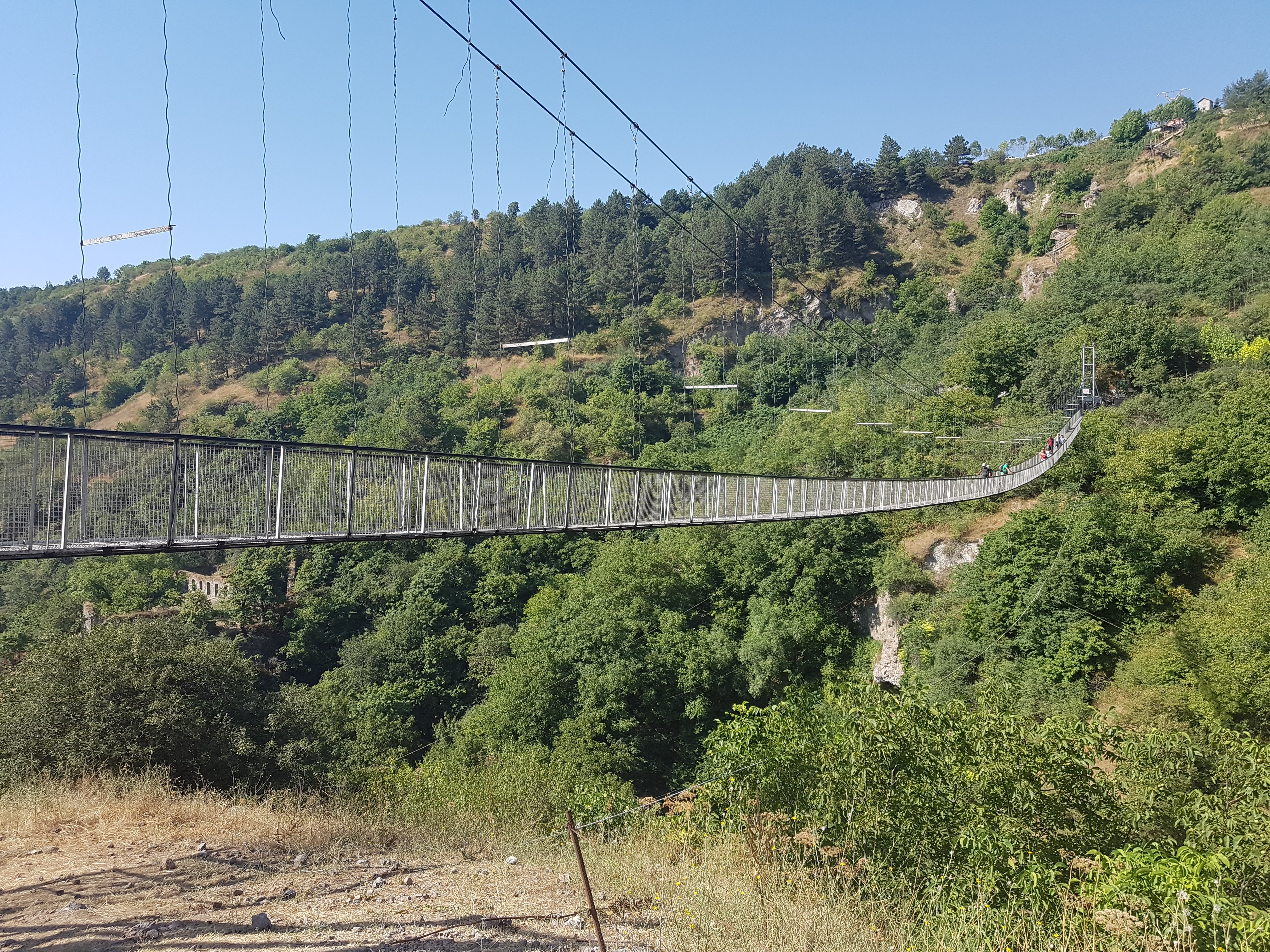 Fotografía tomada el mes de agosto de 2017 en Armenia